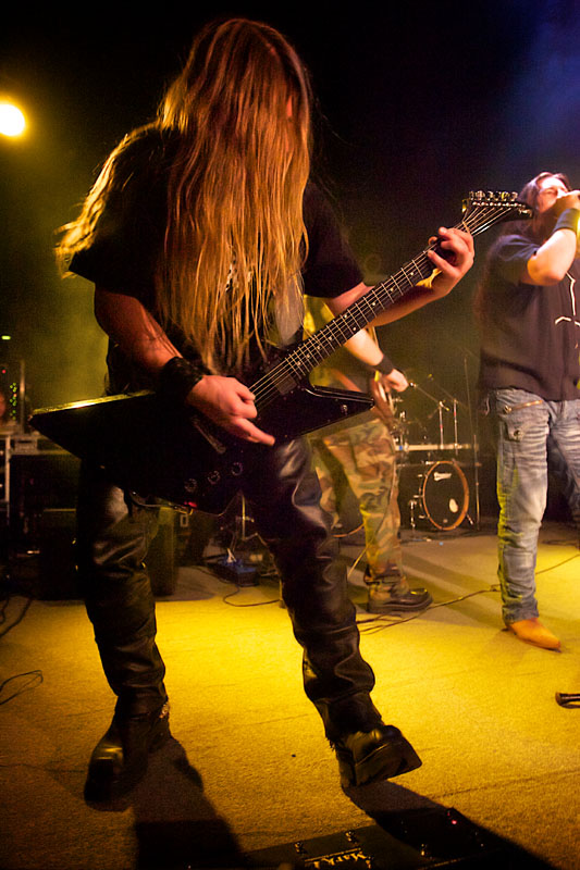 Nomad, Wrocław, Firlej, 13.05.2011